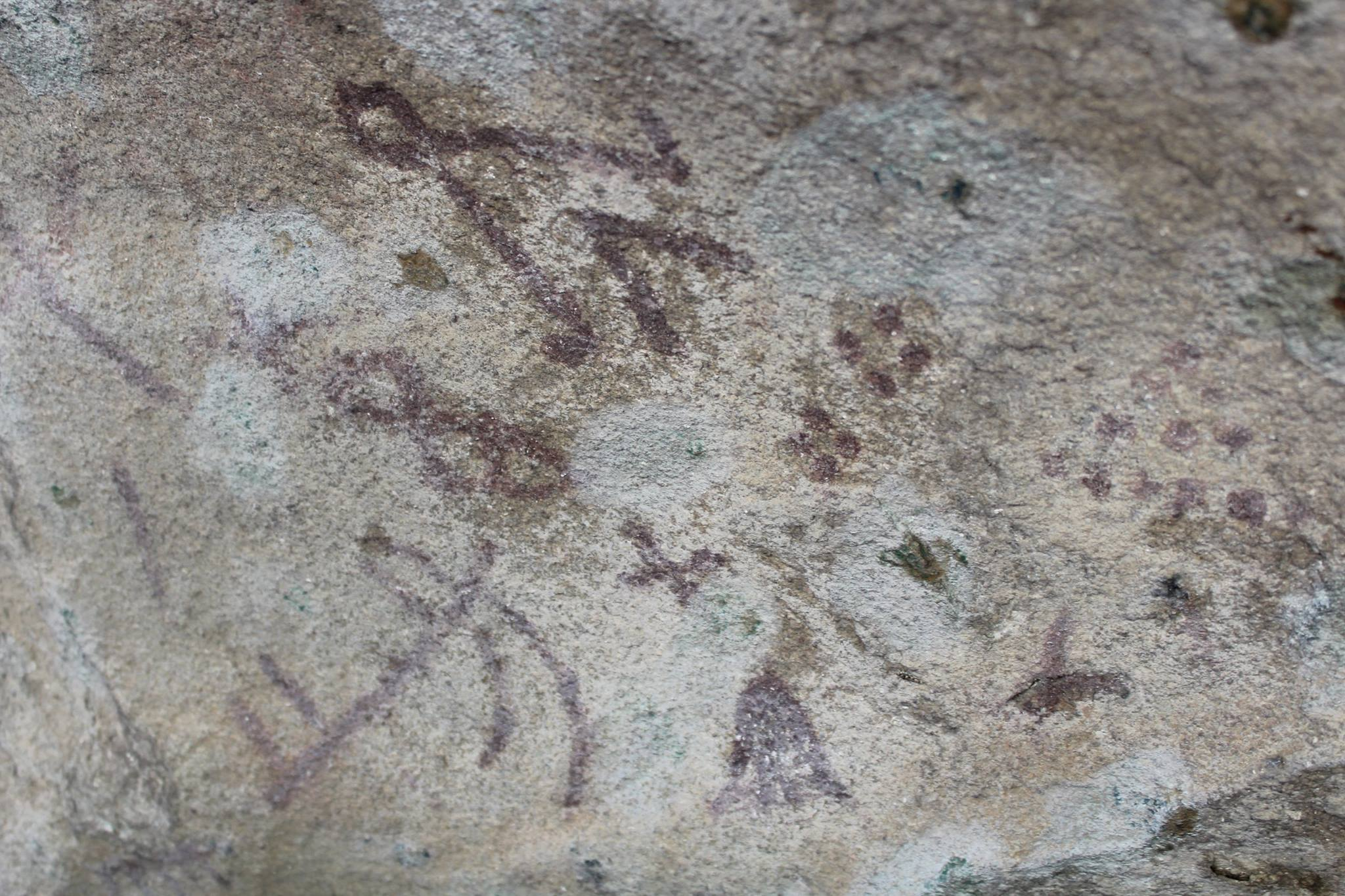 Қазақша (кирил): Ақ бауыр тарихи археологиялық кешеніндегі тас бетіндегі суреттер